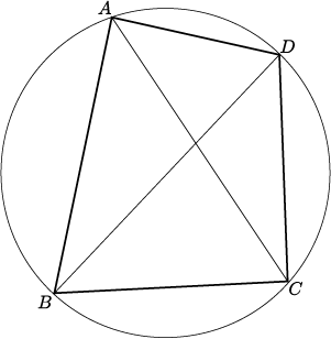 Cyclic quadrilateral